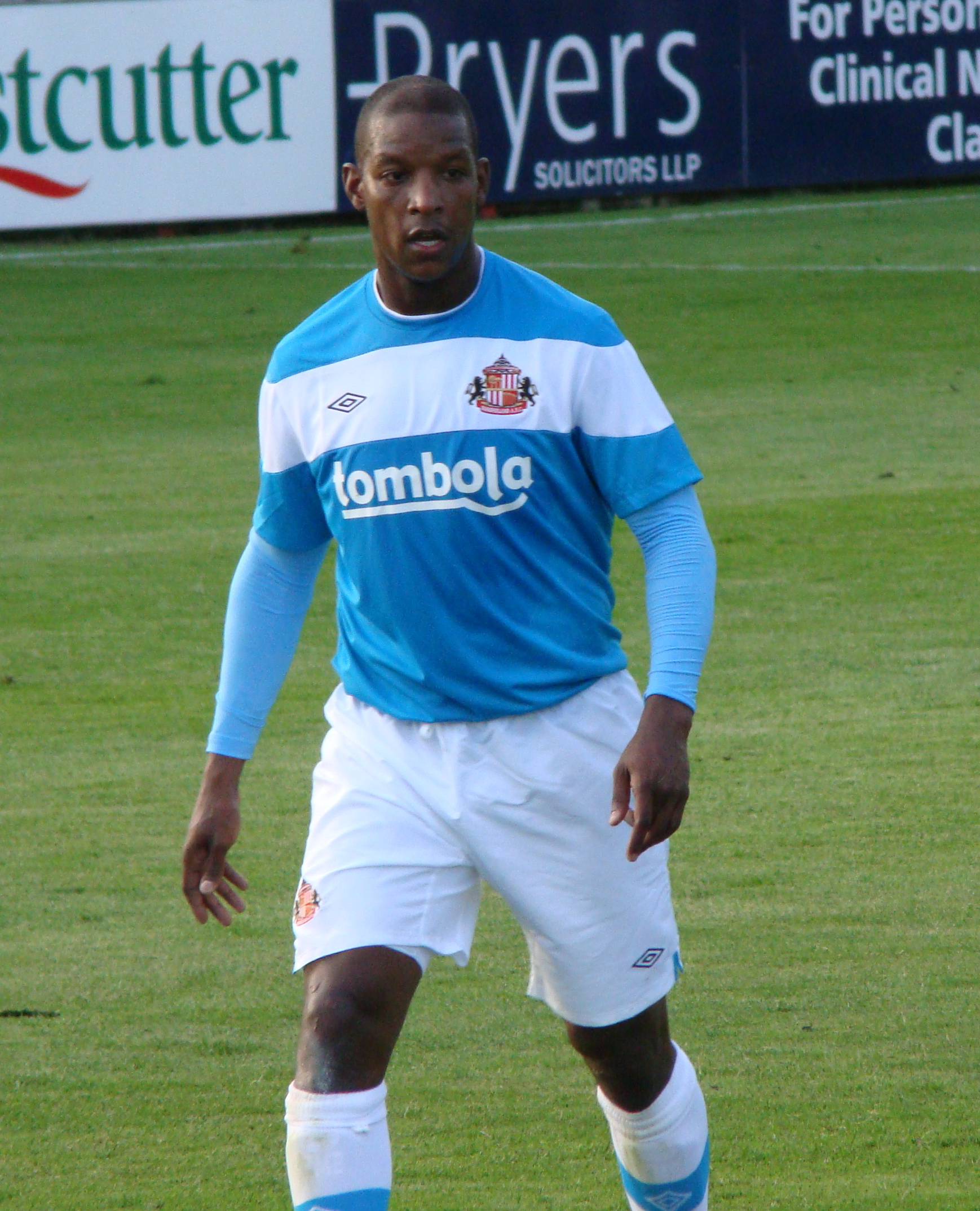 Titus Bramble